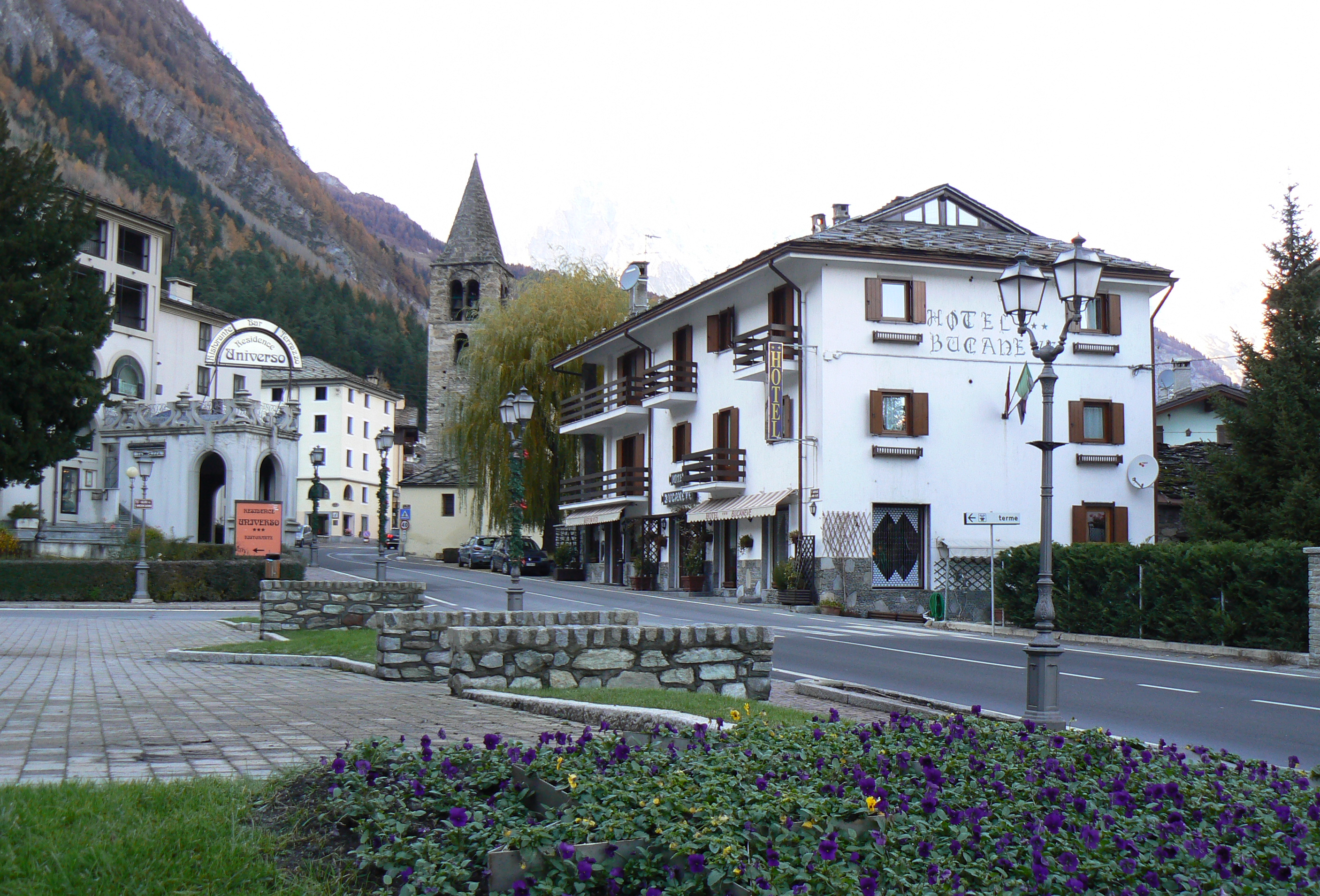 Pré-Saint-Didier, Valle d'Aosta, Italia.